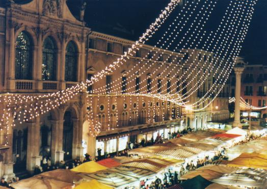 Vicenza, Veneto, Italia